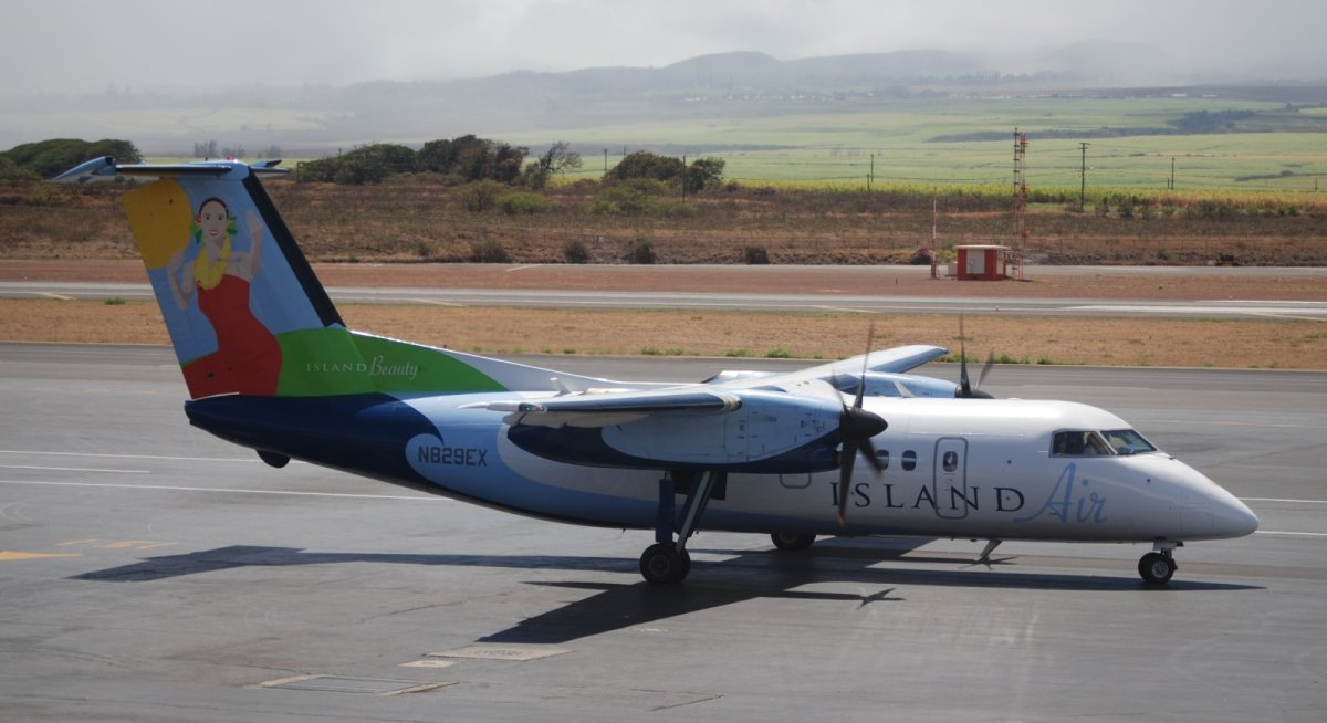 Island Air Dash 8-103 N829EX at Kahului, Maui